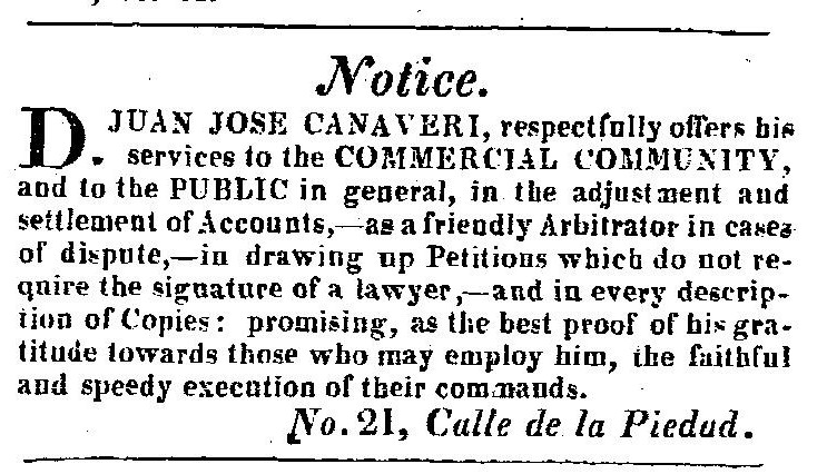 Aviso de Juan José Canaveri (Canaveris), en el periódico de habla inglesa; The British Packet, and Argentine News, publicado el sábado 1 de agosto de 1835, ofreciendo sus servicios de abogado y contador